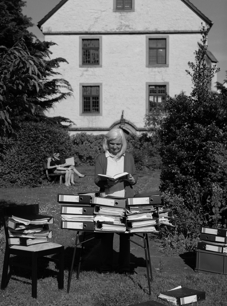 Dr. Bärbel Meurer mit ihrem Marianne-Weber-Archiv vor dem Süsterhaus, in welchem Marianne Weber die Schule besucht hat, in Lemgo 2012.